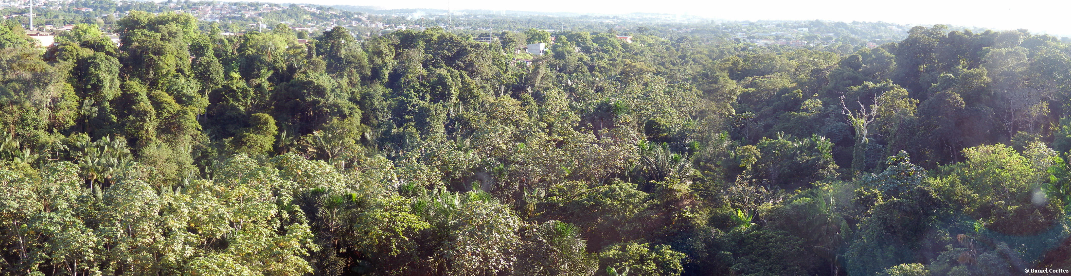 Vista Panorâmica Parque Estadual Sumaúma Manaus-Am